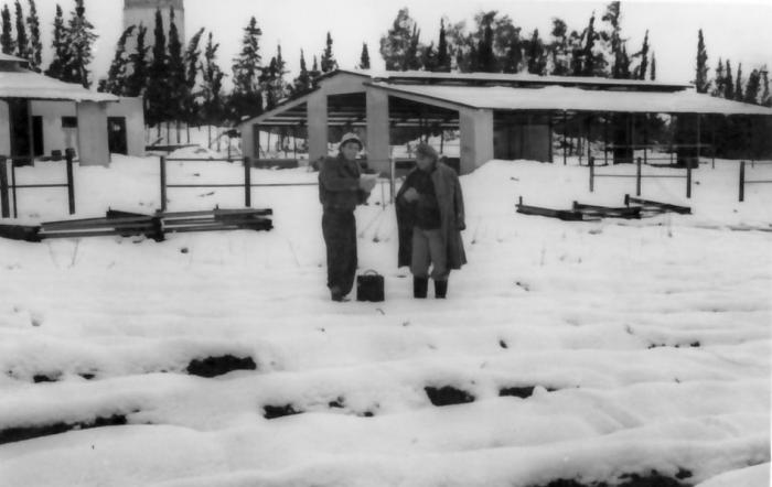 שלג בגן-שמואל 1950 - הרפת החדשה בבנייתה. בתמונה - דונדי שיפר ושלמה הניג